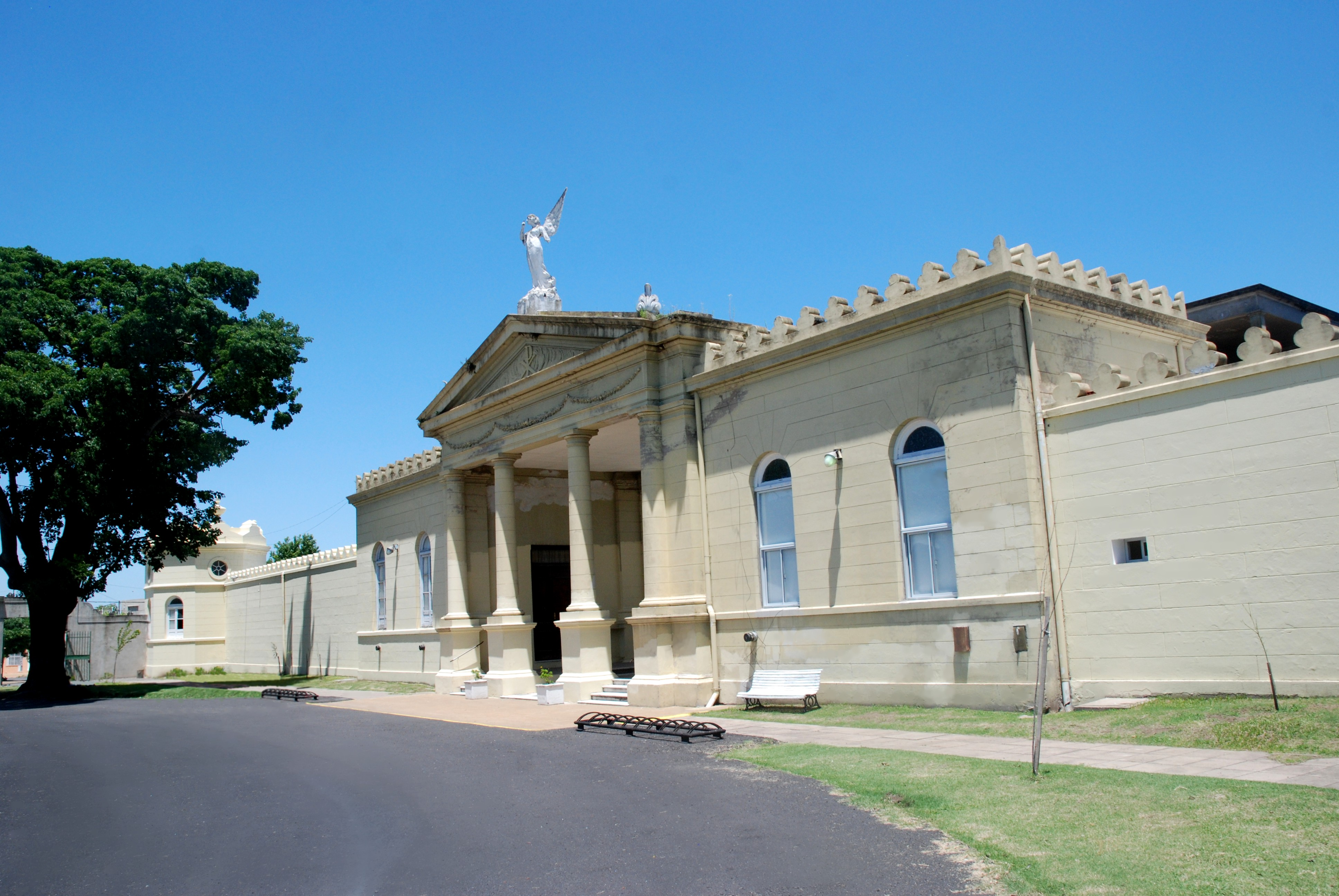 Cementerio Central de Junín, Argentina.